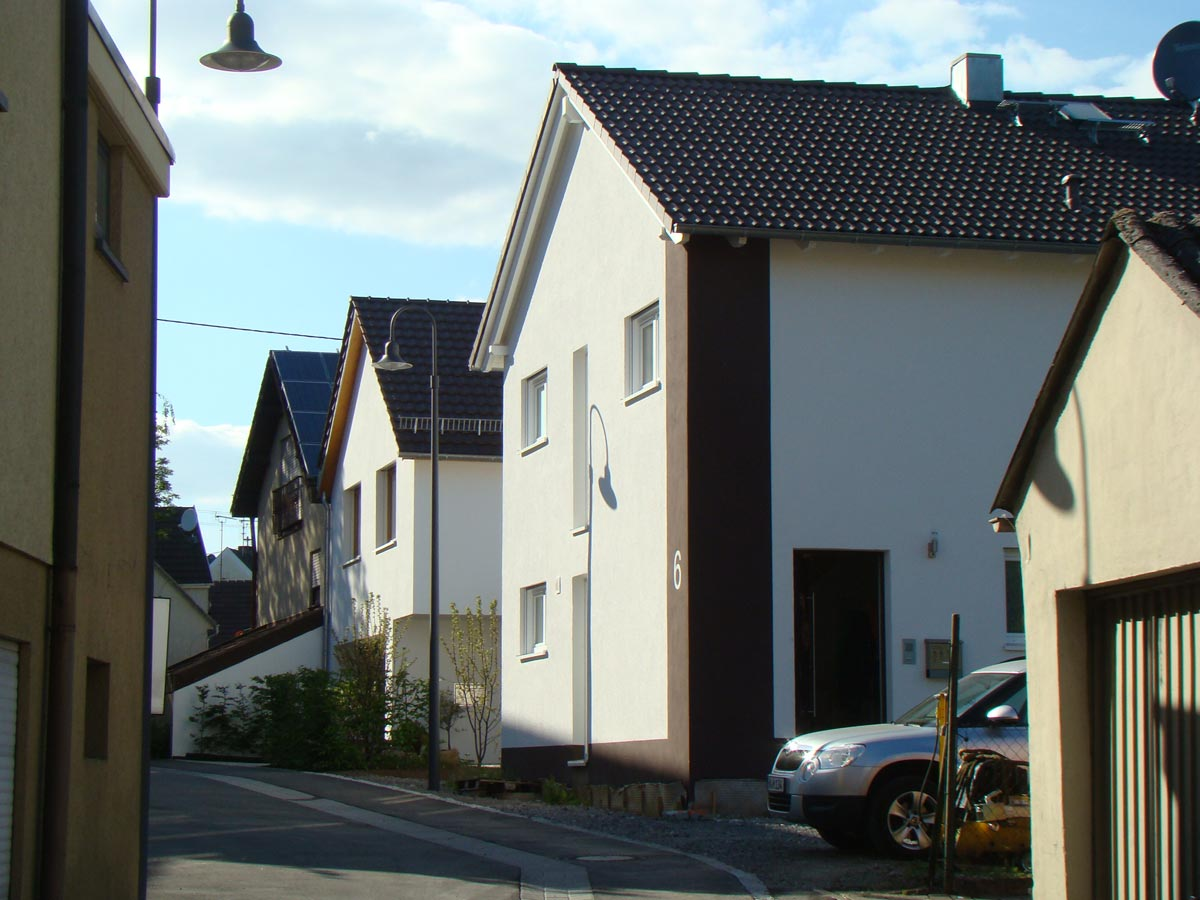 Heilbronn-Biberach, Rappengasse 6, heutige Bebauung